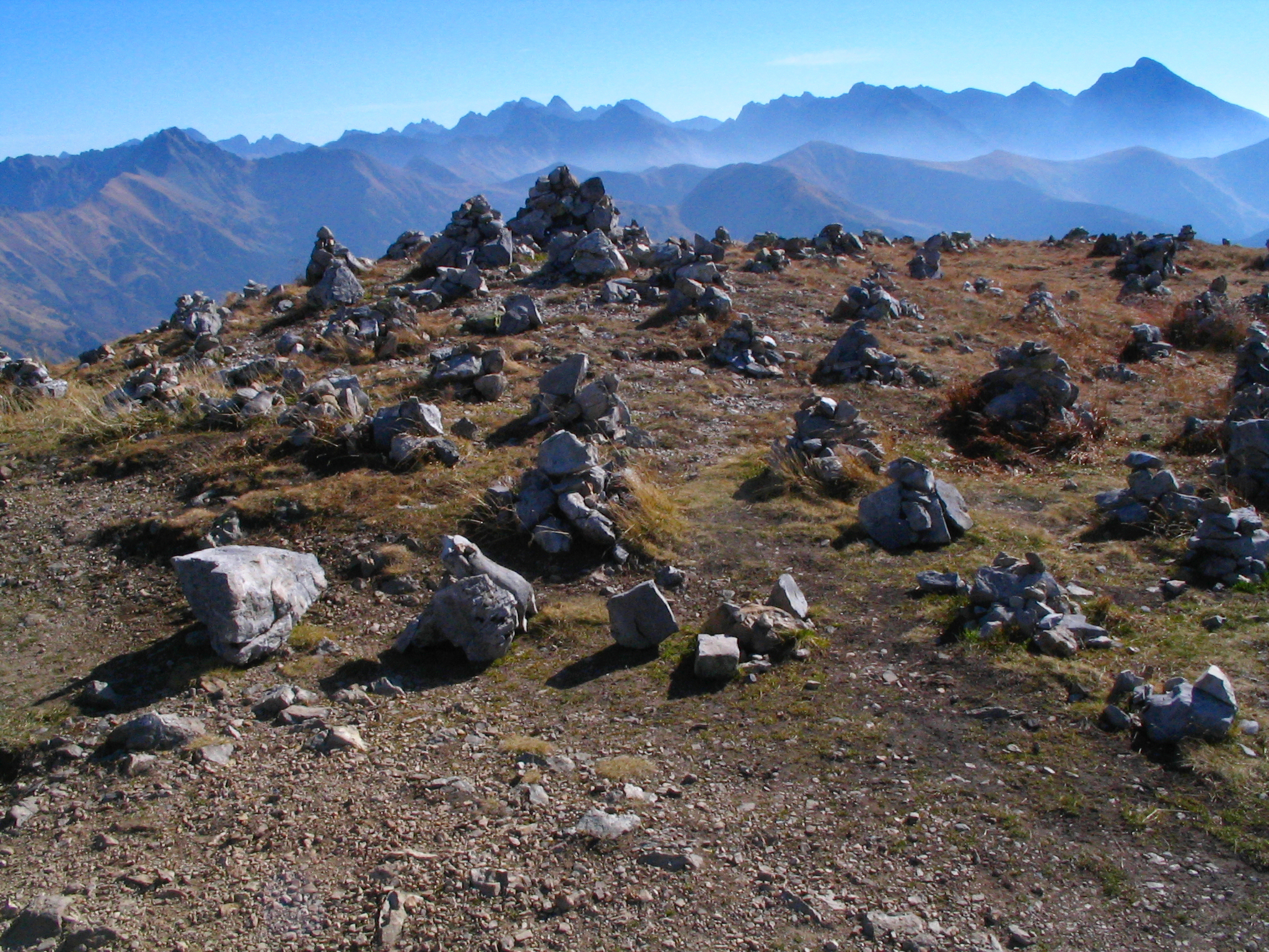 Dol.Kościeliska-Małołączniak-Krzesanica-Ciemniak-Dol.Kościeliska 8